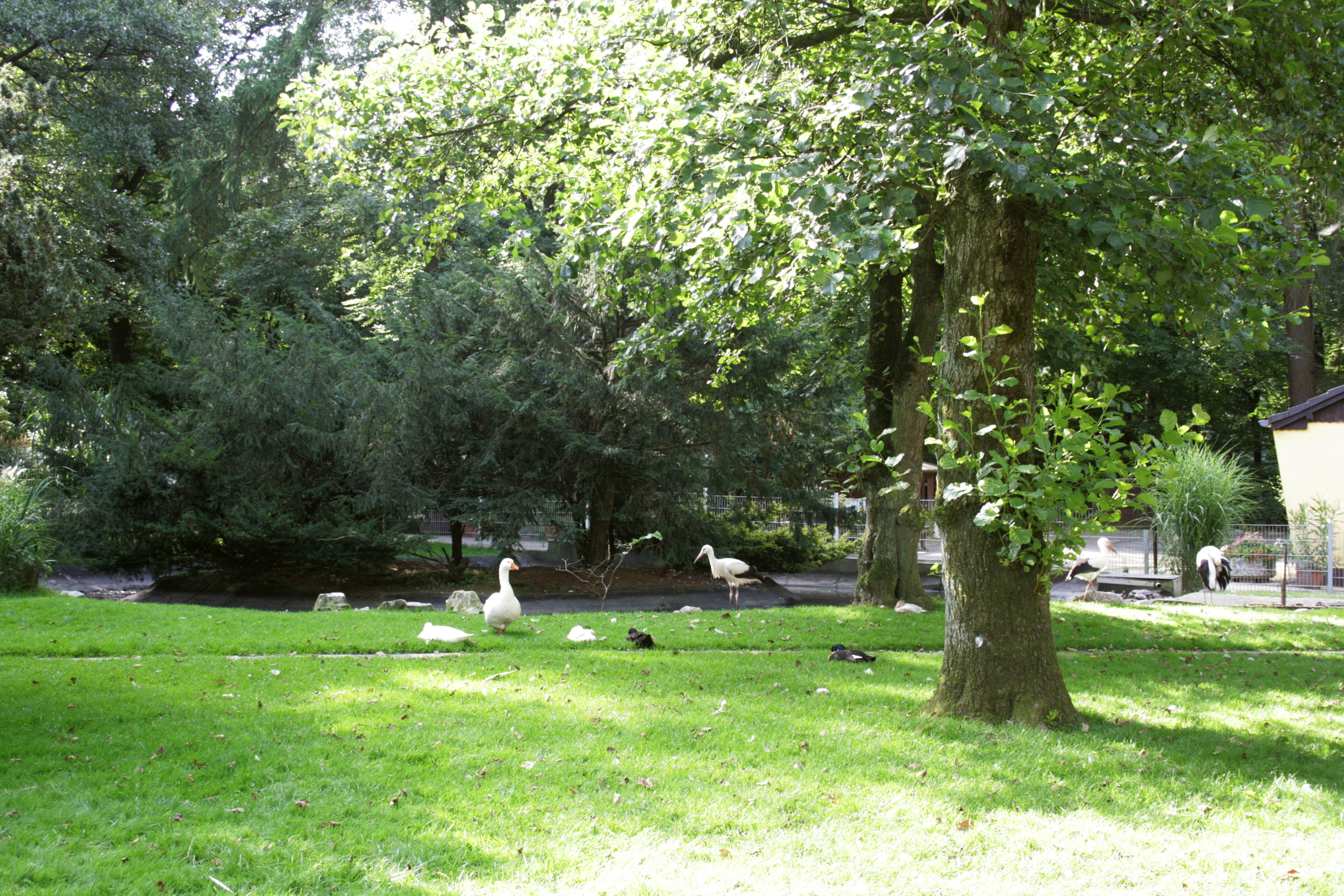 Tierpark Fauna in Solingen-Gräfrath